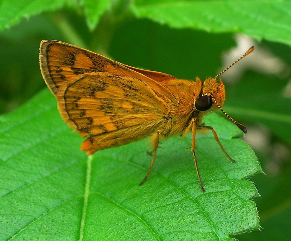 Potanthus serina - Large Dart